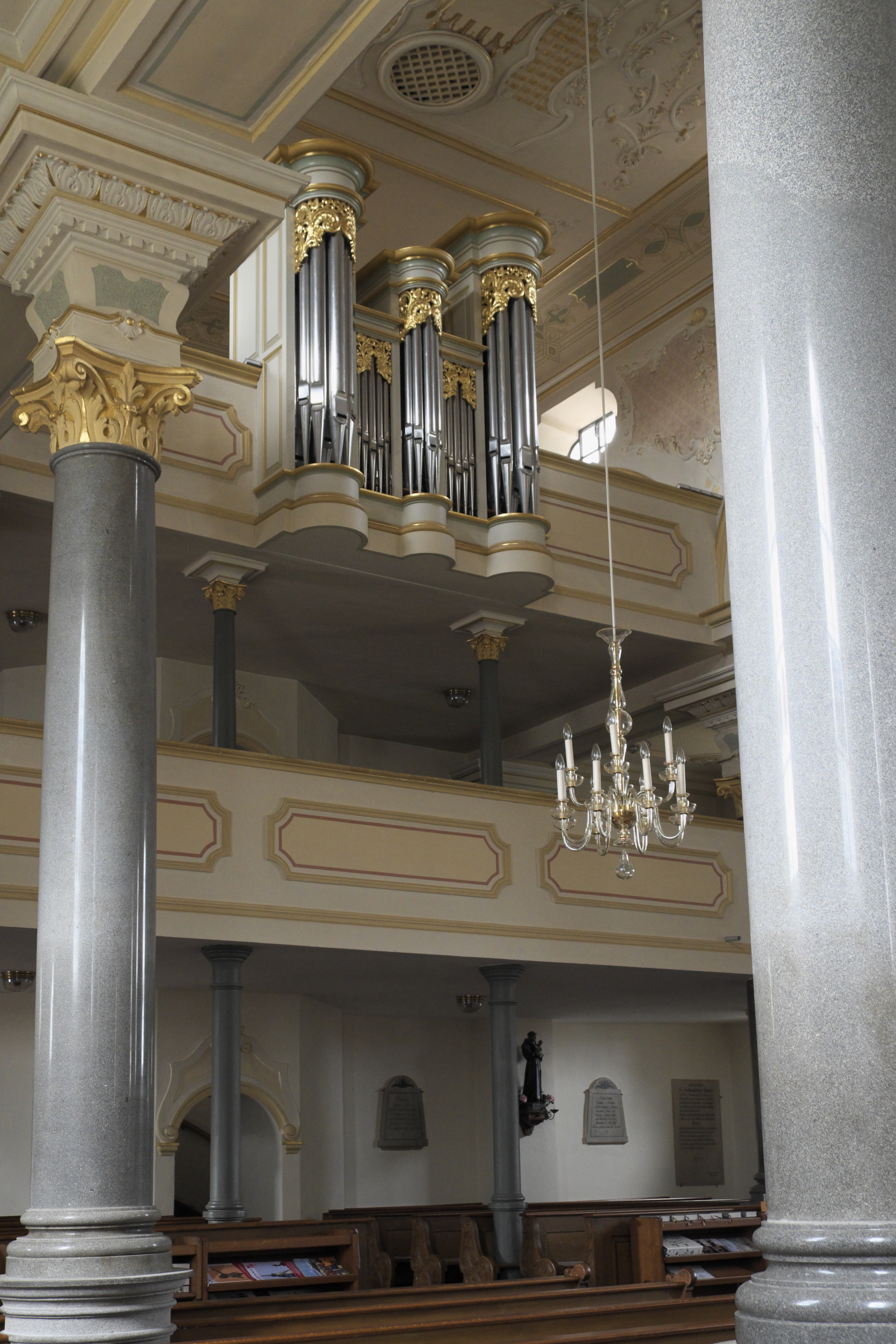 Katholische Pfarrkirche St. Benedikt in Odelzhausen im Landkreis Dachau (Bayern/Deutschland), Doppelempore mit Orgel